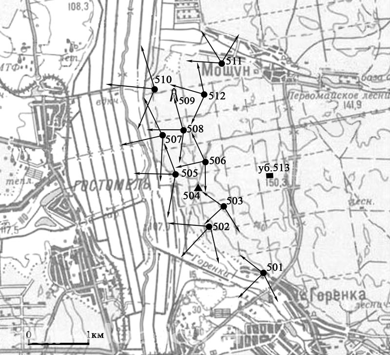 Схема БРО 13 Київського укріпленого району, викладена у вільний доступ авторами книги "Киевский укрепленный район 1928—1941" (